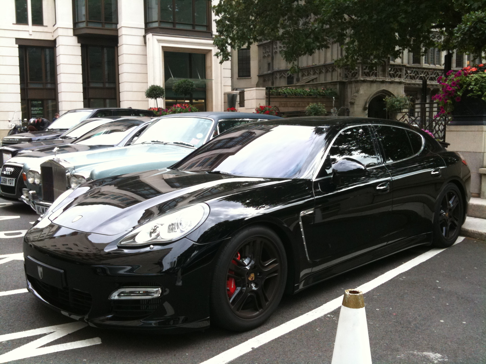 Porsche Panamera à Londres